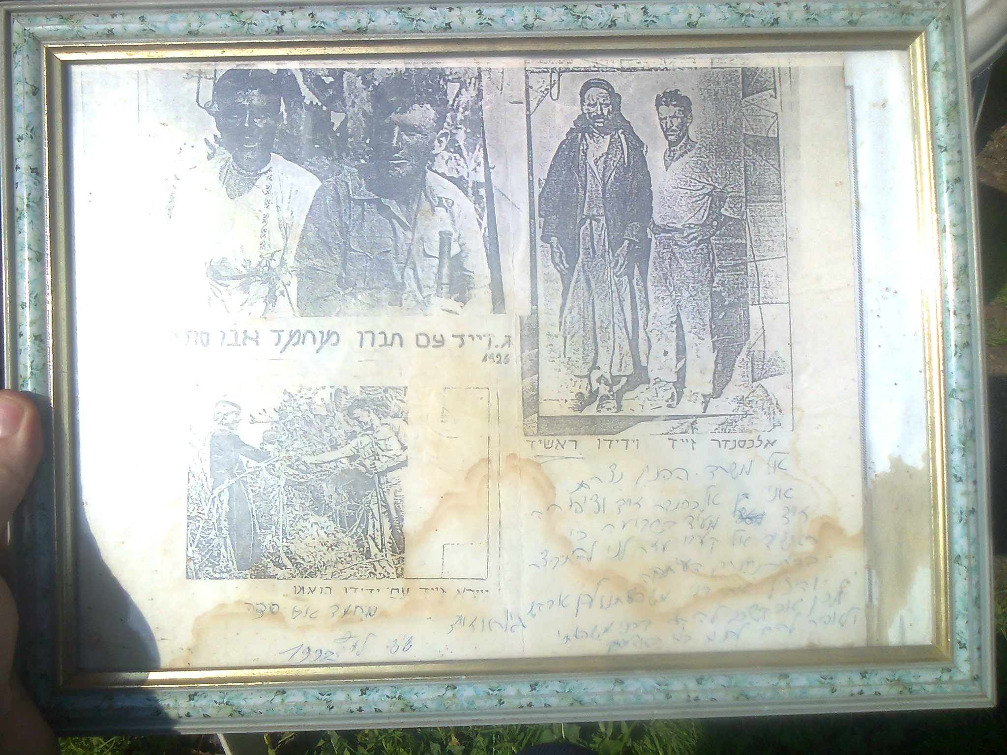 כיתוב בעט: אל משרד הפנים נצרת אני בן אלכסנדר זייד וציפורה זייד מעיד בשבועה כי ראשיד אל כעבי עזר לנו להתבצר בבית שערים העתיקה והציל את את בני משפחתי לכן אבקשכם להכיר בבני משפחתו ולאפשר הם לבנות בית באדמתם 18 למרץ 1997 (או 1992 - לא ברור)